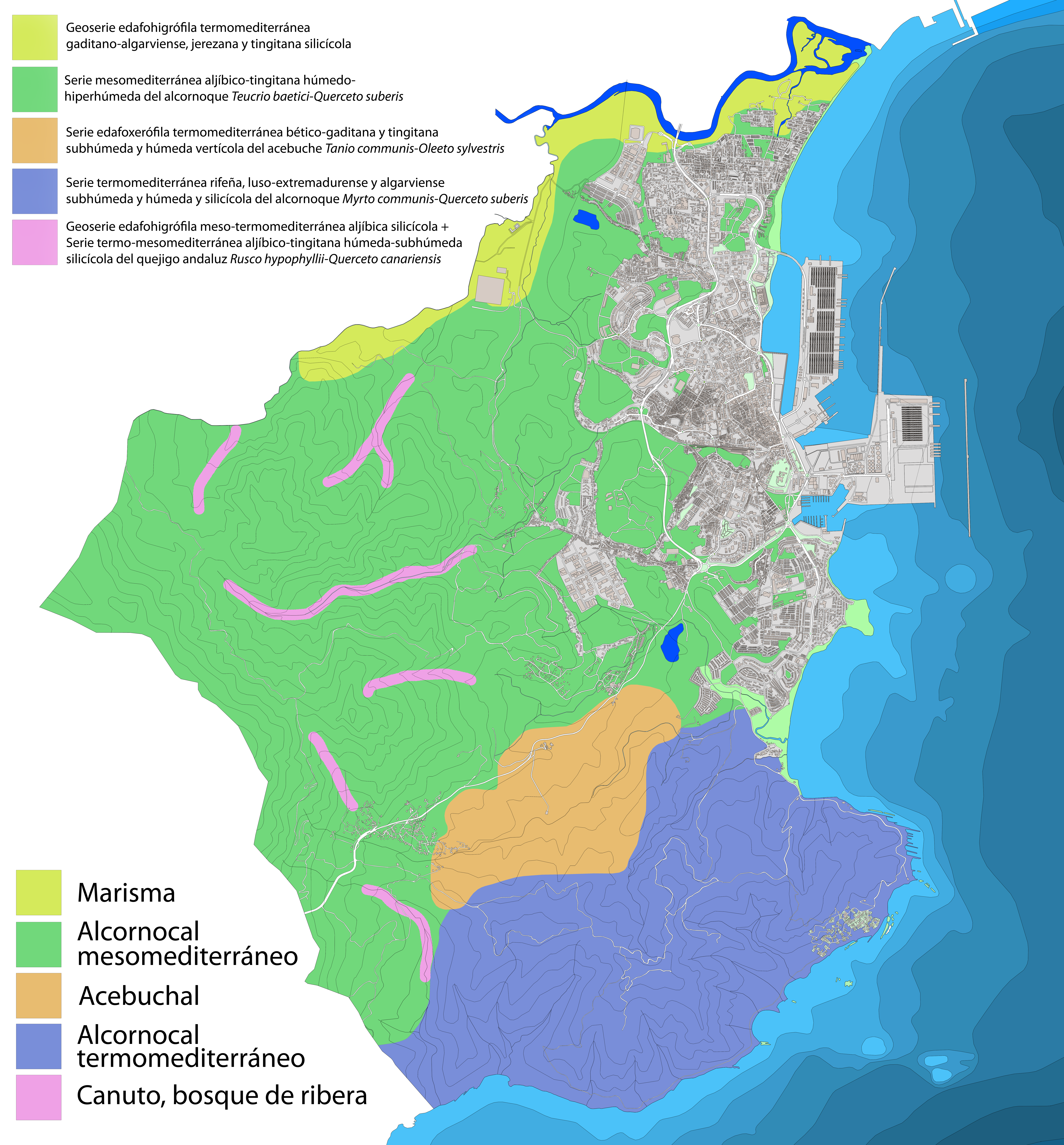 Mapa del término municipal de Algeciras indicando sus unidades de vegetación. Algeciras, Andalucía, España.